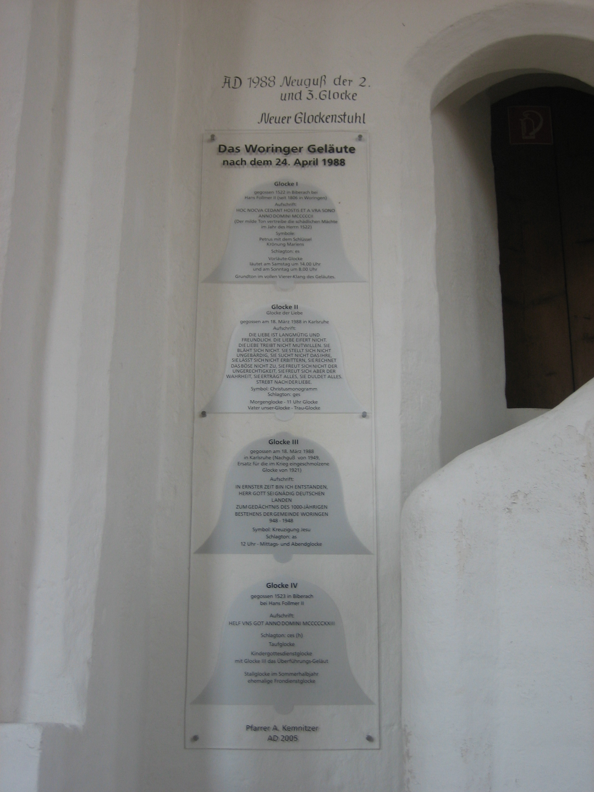 Woringen Unser Frauen